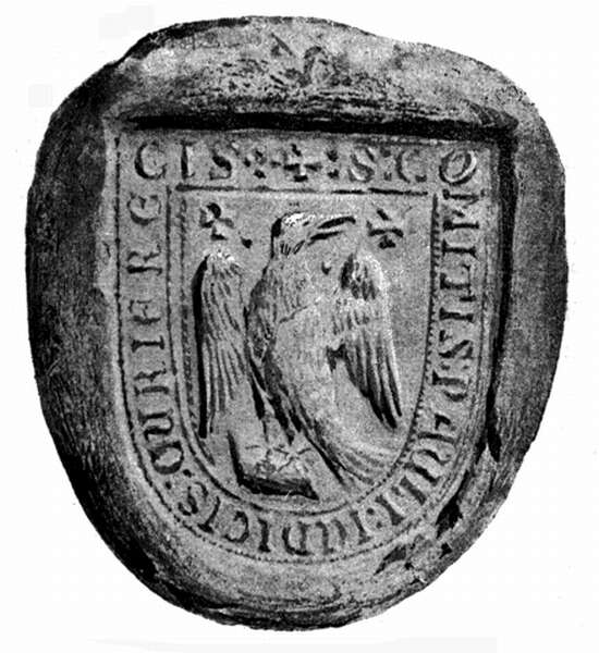 Nagymartoni Pál országbíró pecsétje